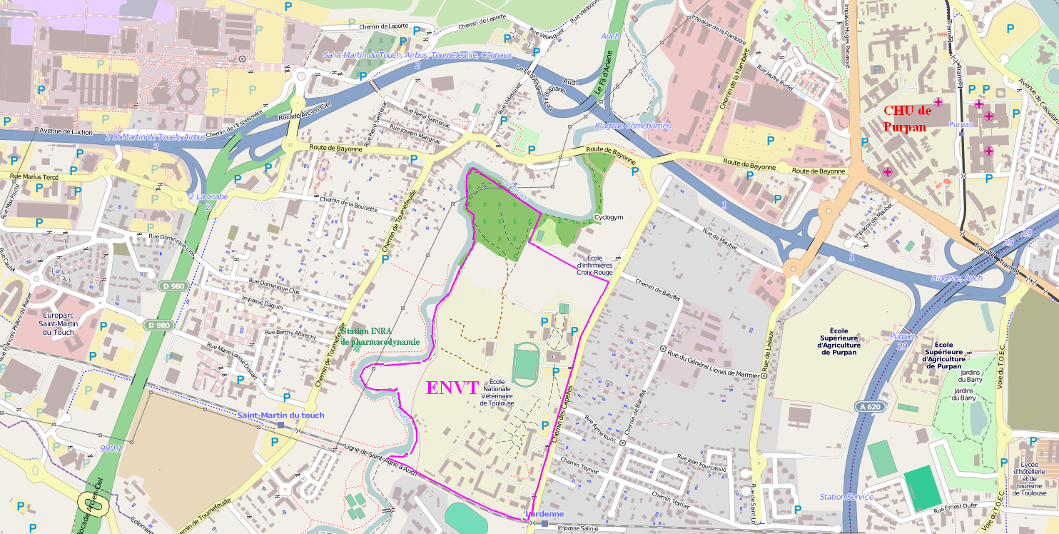 Carte Openstreetmap montrant les imites de l’École nationale vétérinaire de Toulouse (après extension) et sa situation par rapport aux autres établissements d'enseignement et de recherche : la station INRA de Tournefeuille et le CHU de Toulouse Purpan en particulier, et par rapport aux rocades de l'ouest toulousain